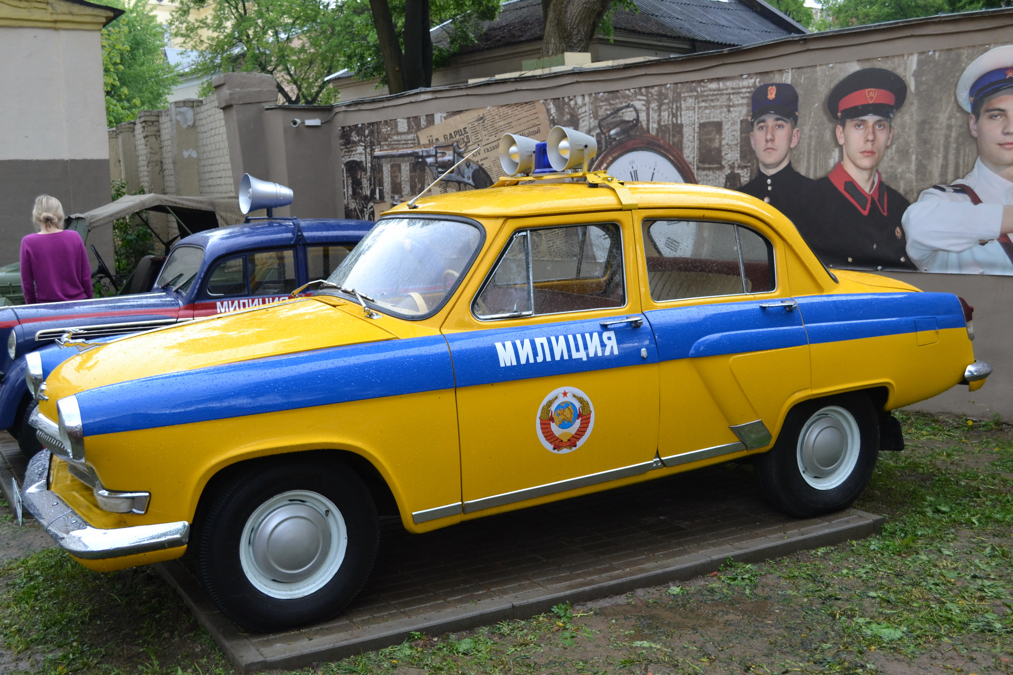 Беларуская (тарашкевіца): Вікісустрэча ў Менску 17 траўня 2014